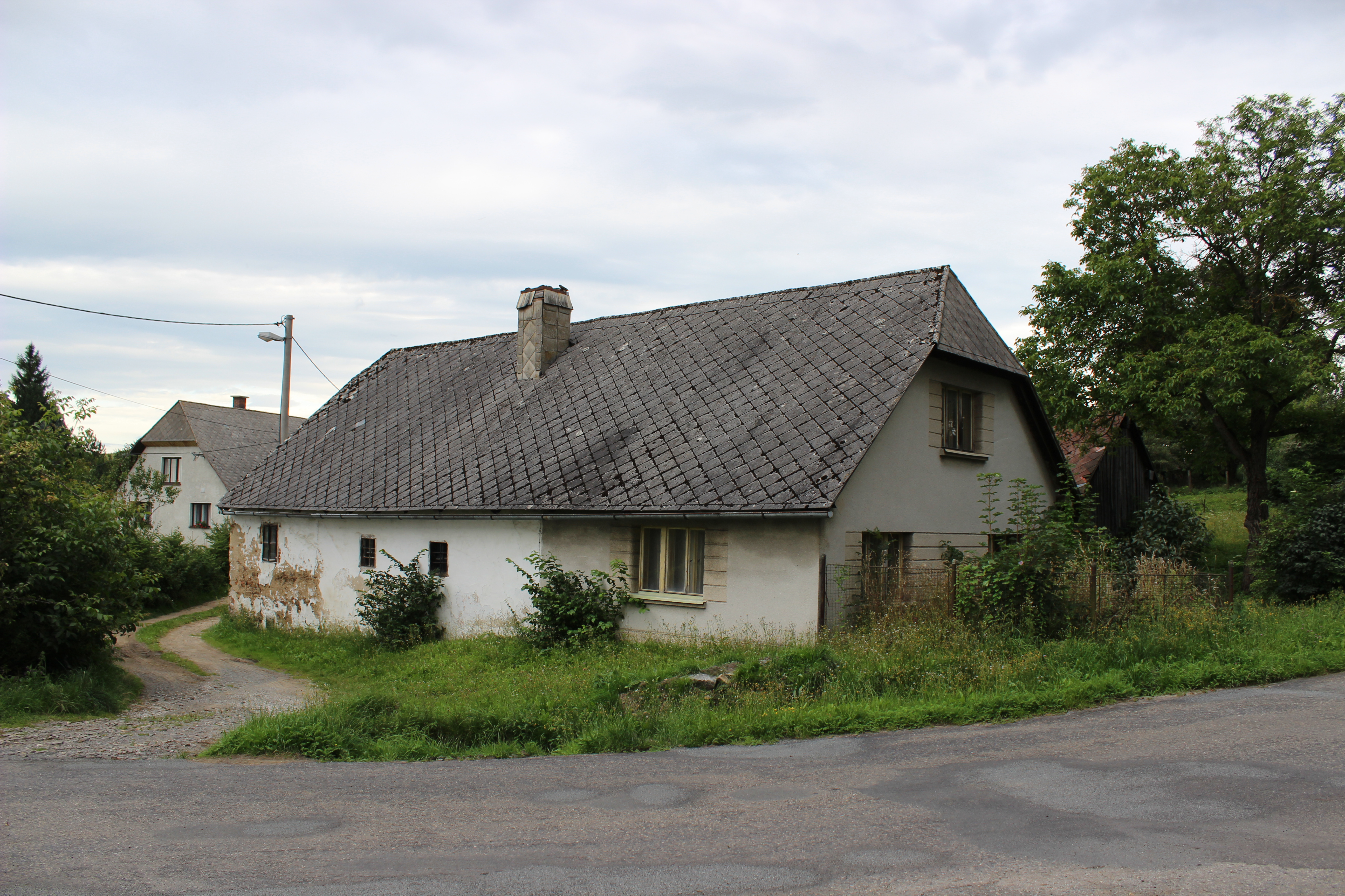 Dům ve Vlastějově.